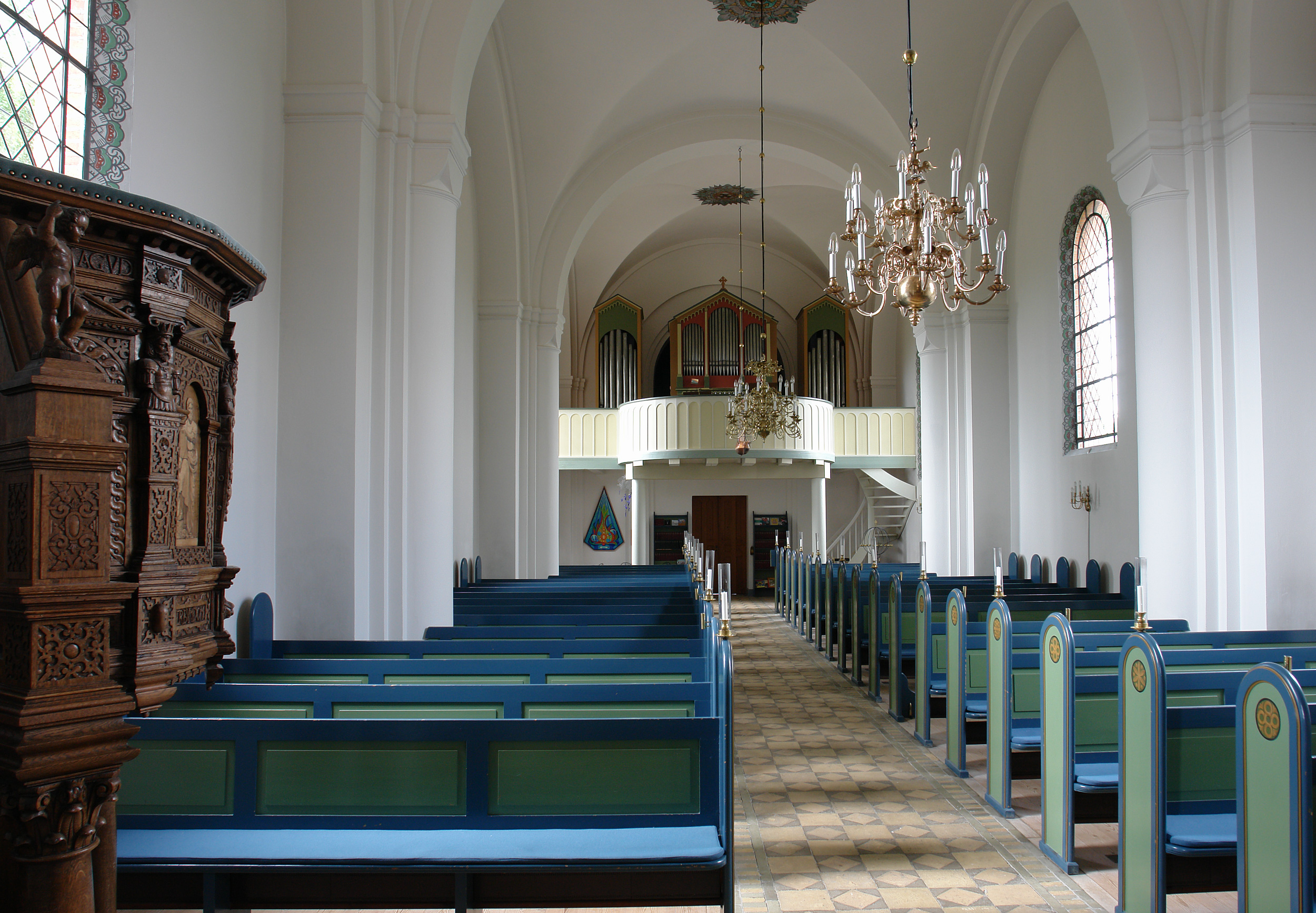 Kirche von Ugerløse, Dänemark (West-Seeland). Die Orgel wurde von der Fa. A. H. Busch & Söhne (Kopenhagen) im Jahre 1884 gebaut